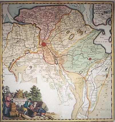 "Groningen en Ommelanden", Groningen met Westerwolde. Kopergravure, ingekleurd, 33 x 32 cm., door Isaak Tirion, 1750.